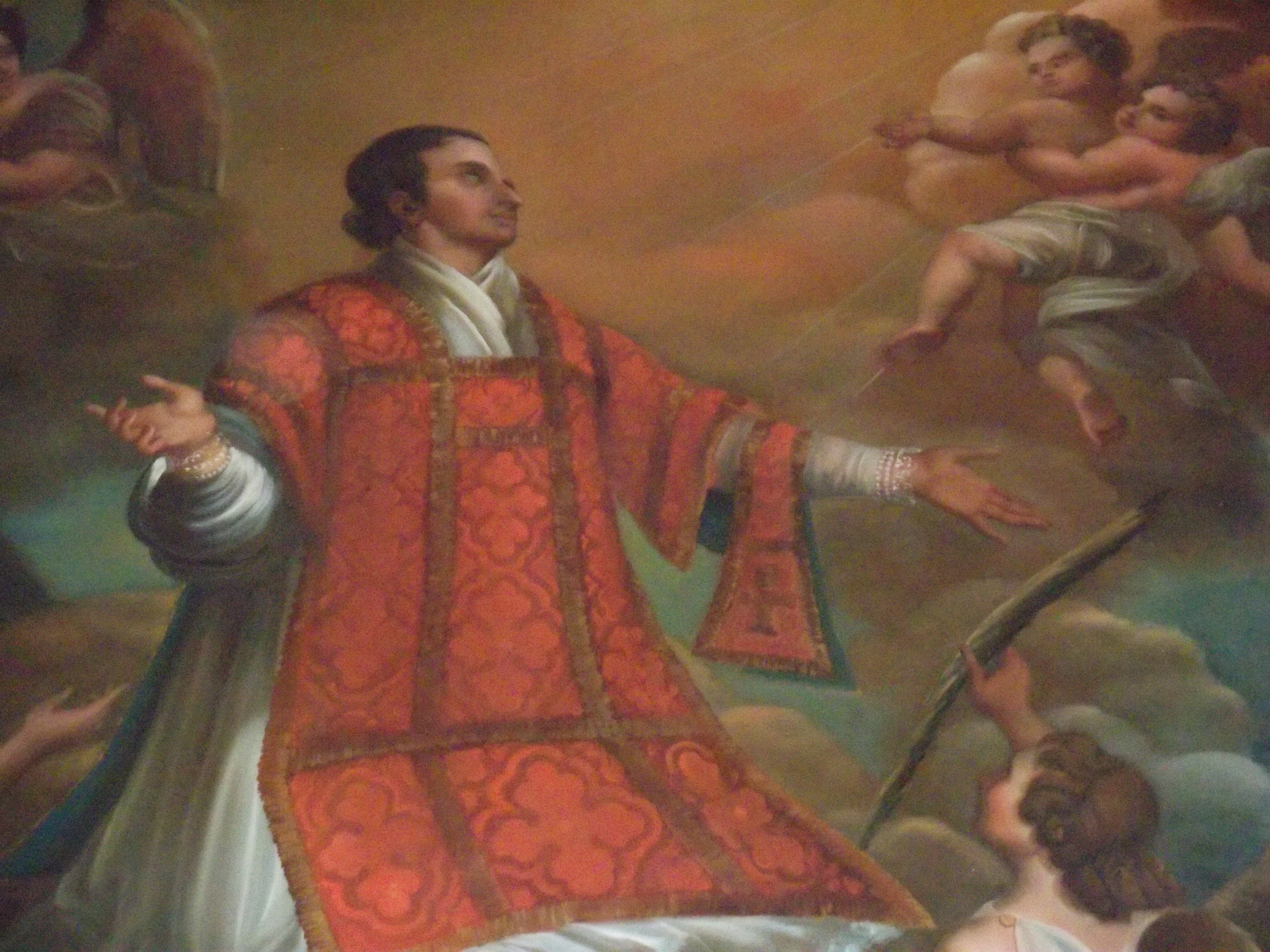 Tableau représentant Saint Andéol - Eglise de Saint-Andéol-de-Berg